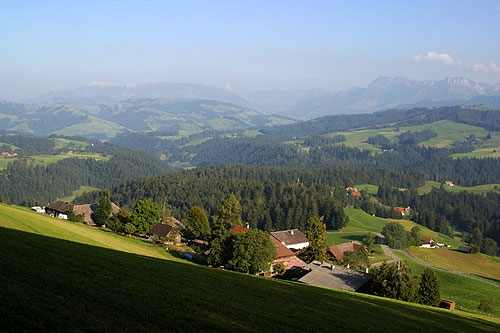 Chuderhüsi ob Würzbrunnen (Röthenbach)